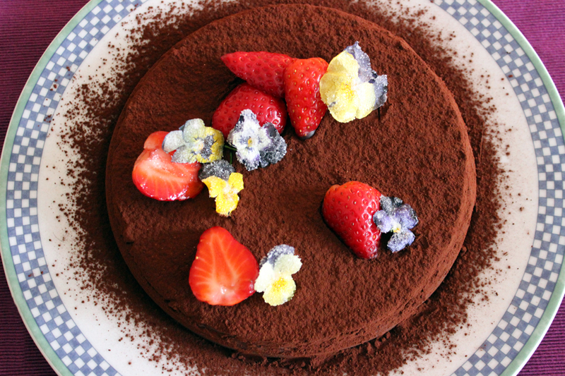 Diese Schoko-Trüffel-Torte gehört zu den kalorienhaltigen Lebensmitteln. Sie enthält etwa 550 kcal je 100 g.